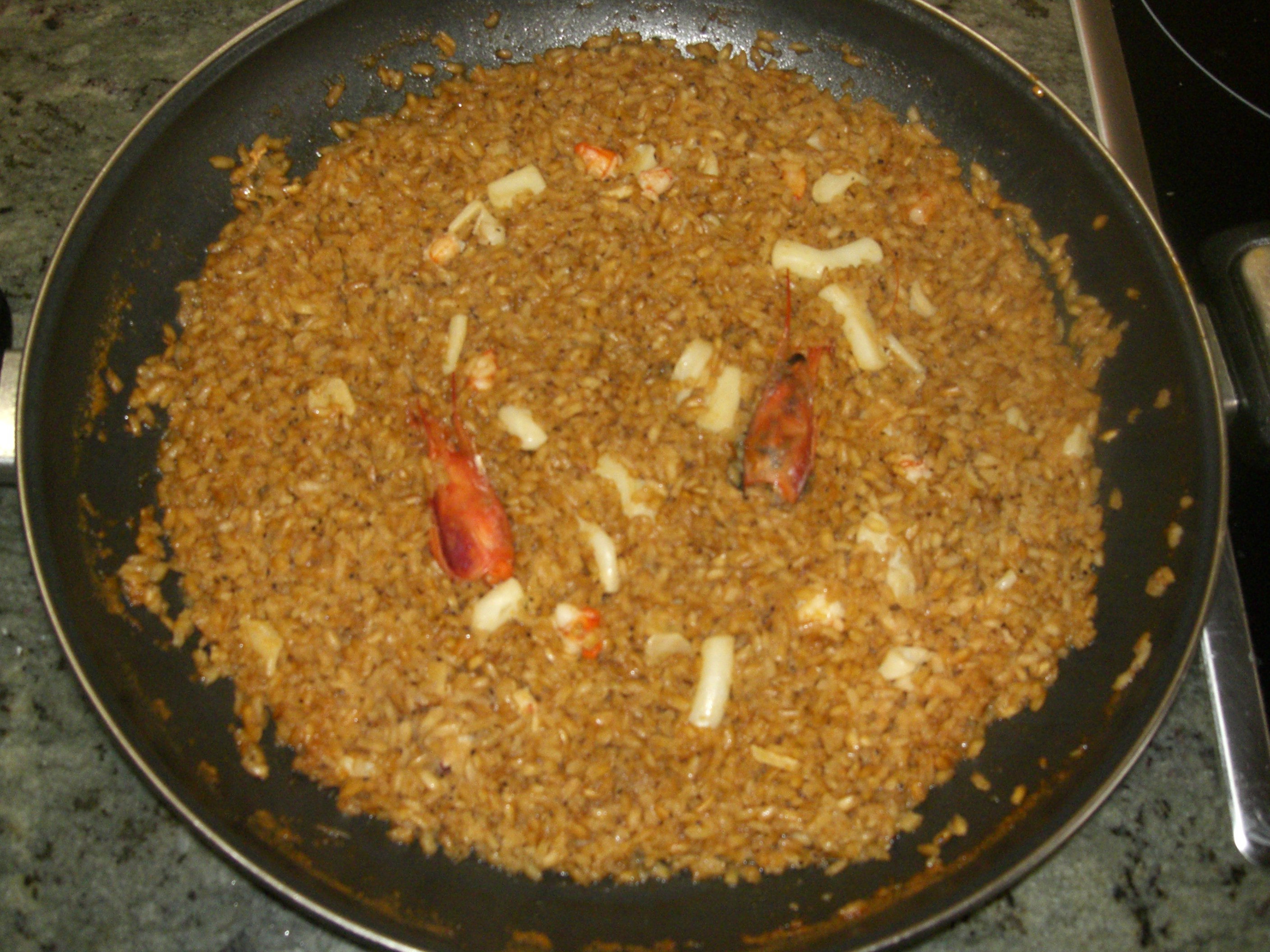 Foto de un arrossejat